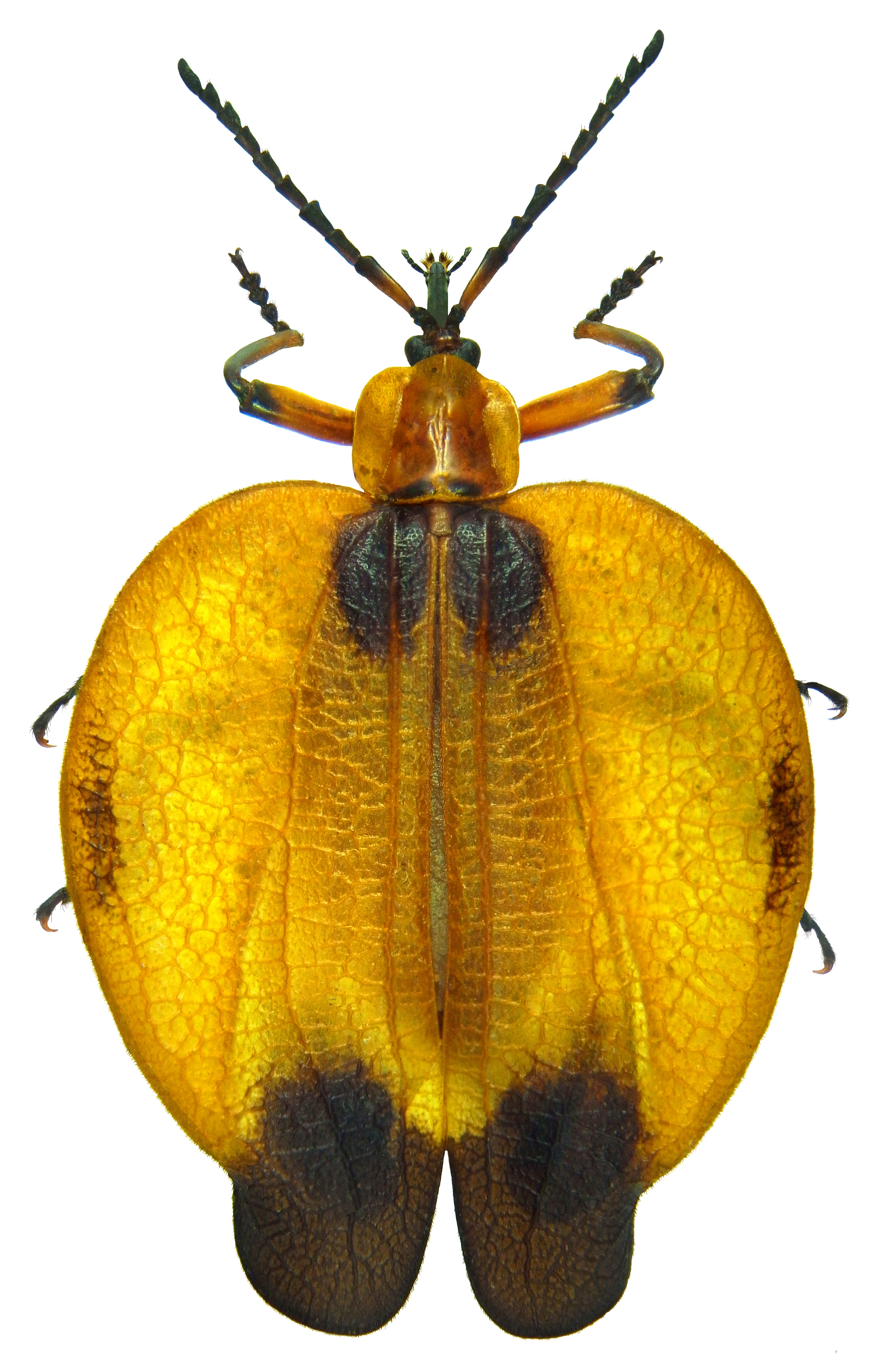 Familie: Lycidae Groesse: 26 mm Fundort: Namibia, Windhoek, Dan Viljoen Park, 1800 m leg. U.Schmidt, 13.III.1994; det. U.Schmidt, 2012 Photo: U.Schmidt, 2012